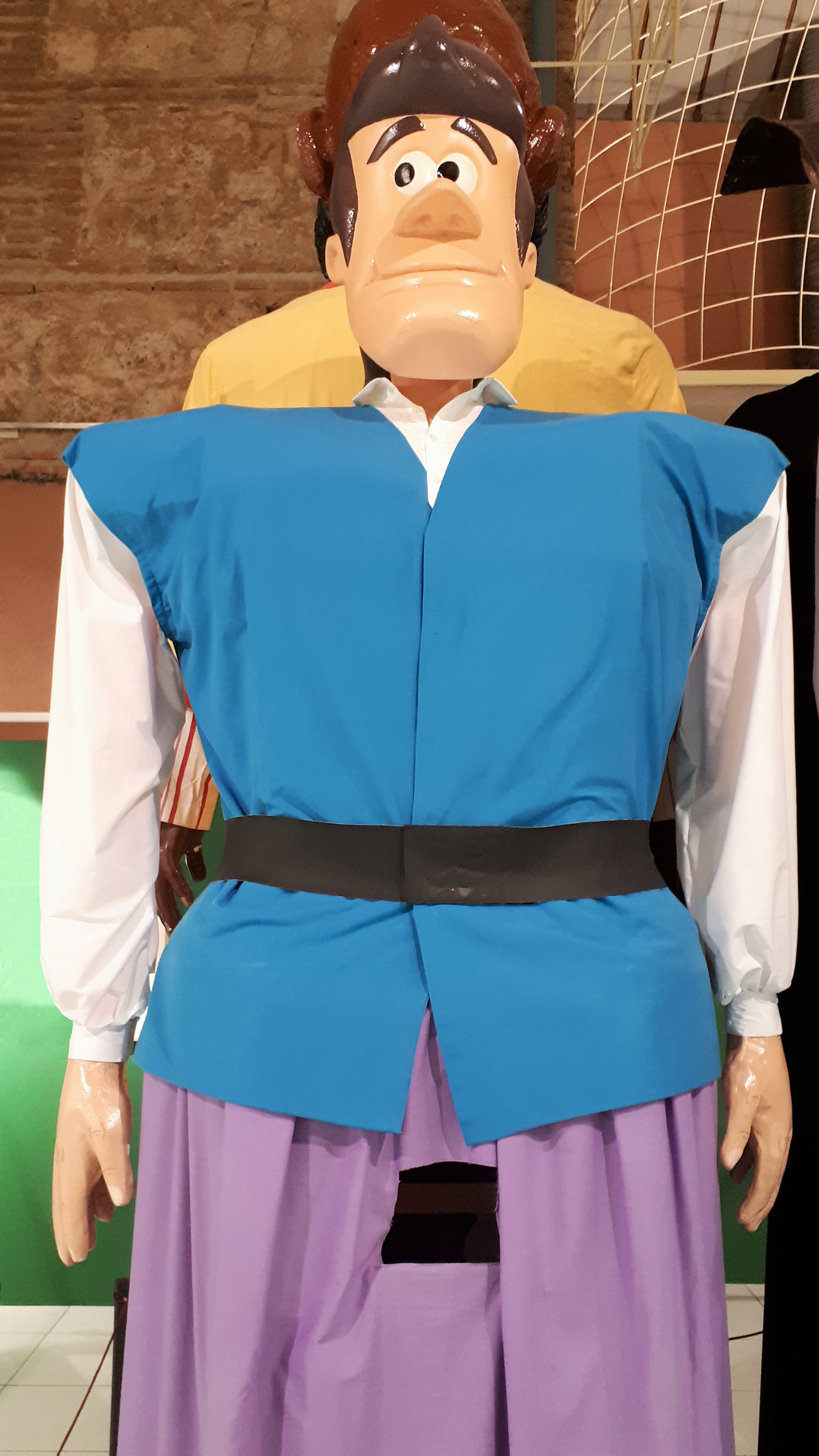 Gigante "Maese Nicolás" de la Comparsa Cervantina de Alcalá de Henares (Comunidad de Madrid - España). Maese Nicolás es un personaje del libro Don Quijote de la Mancha. Fotografía tomada en la Capilla del Oidor el 12 de julio de 2020.